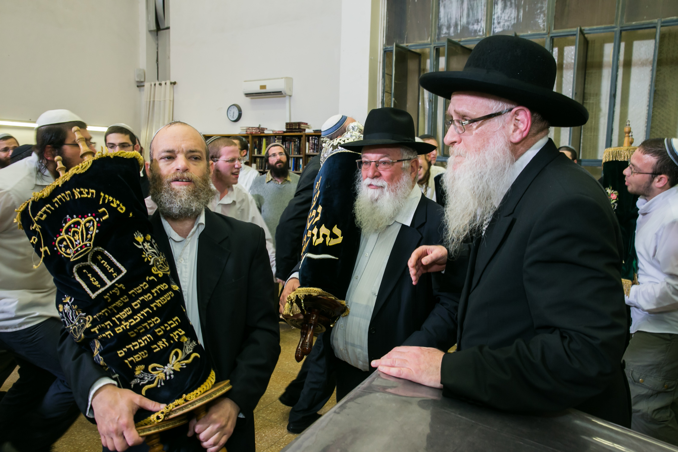 ישיבת מרכז הרב. הרב יהושע בן-מאיר עם הרב יהושע מגנס והרב אבינועם זומר, תשע"ה